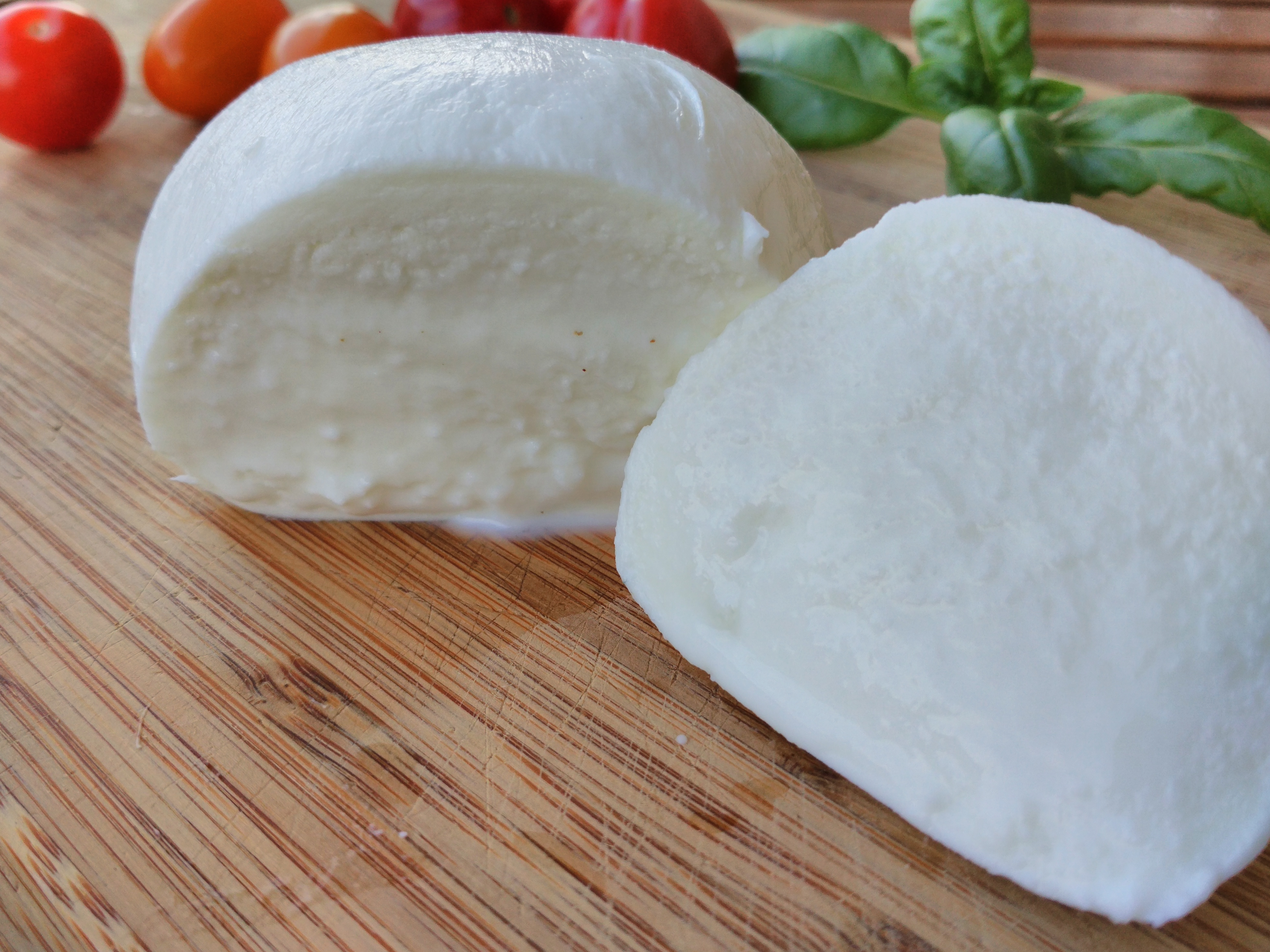 buffalo mozzarella